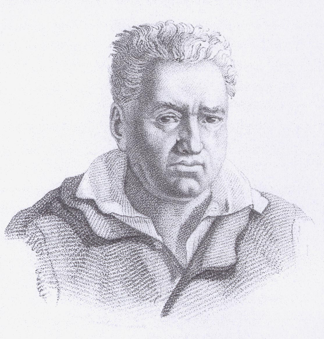 F.X. Tourte engraving